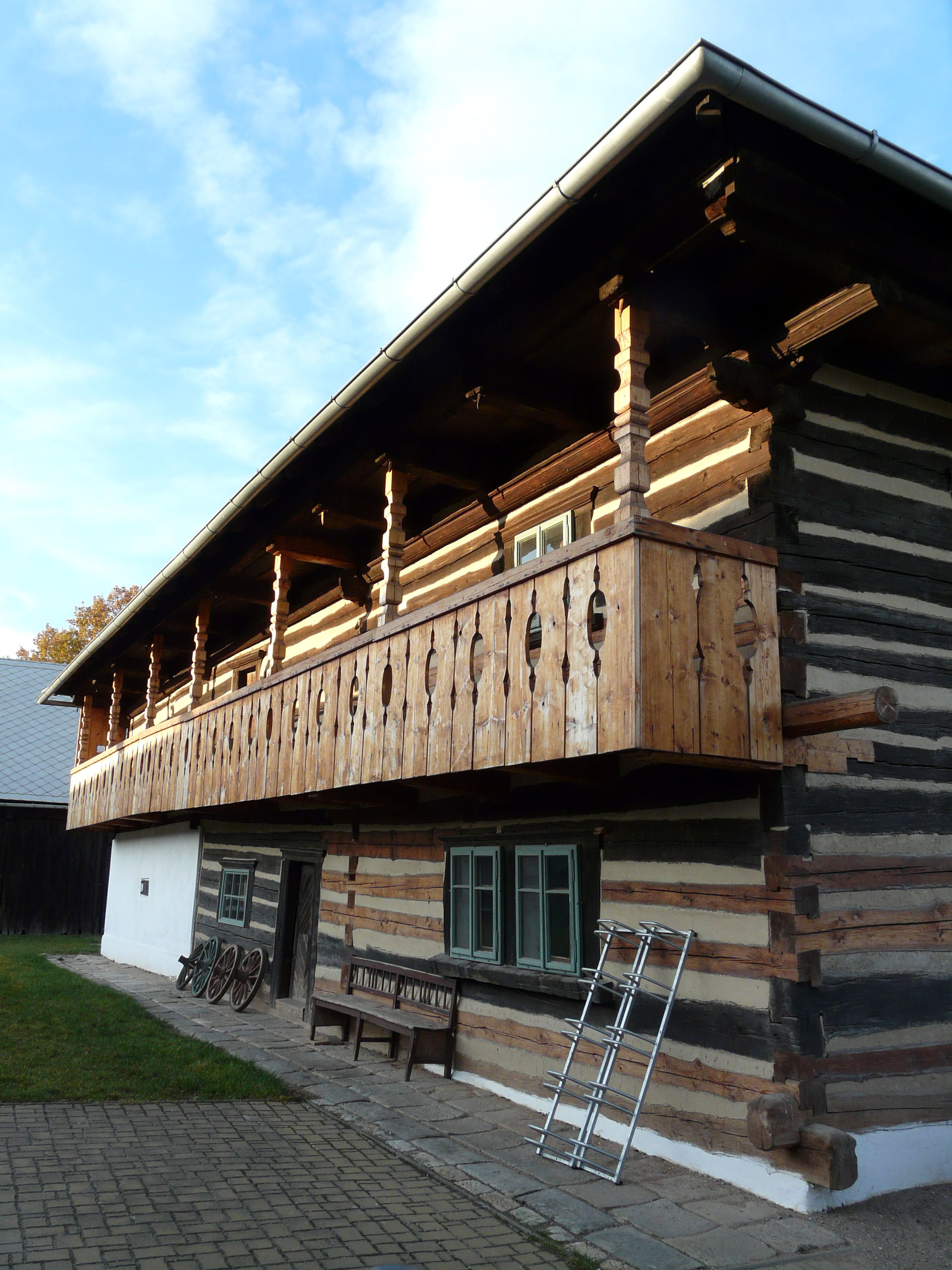 Venkovská usedlost Šrámkův statek (Piletice), Piletická 6/7, Piletice